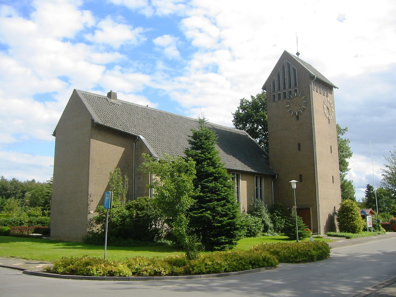 Dorfkirche in Goch-Nierswalde (Deutschland)